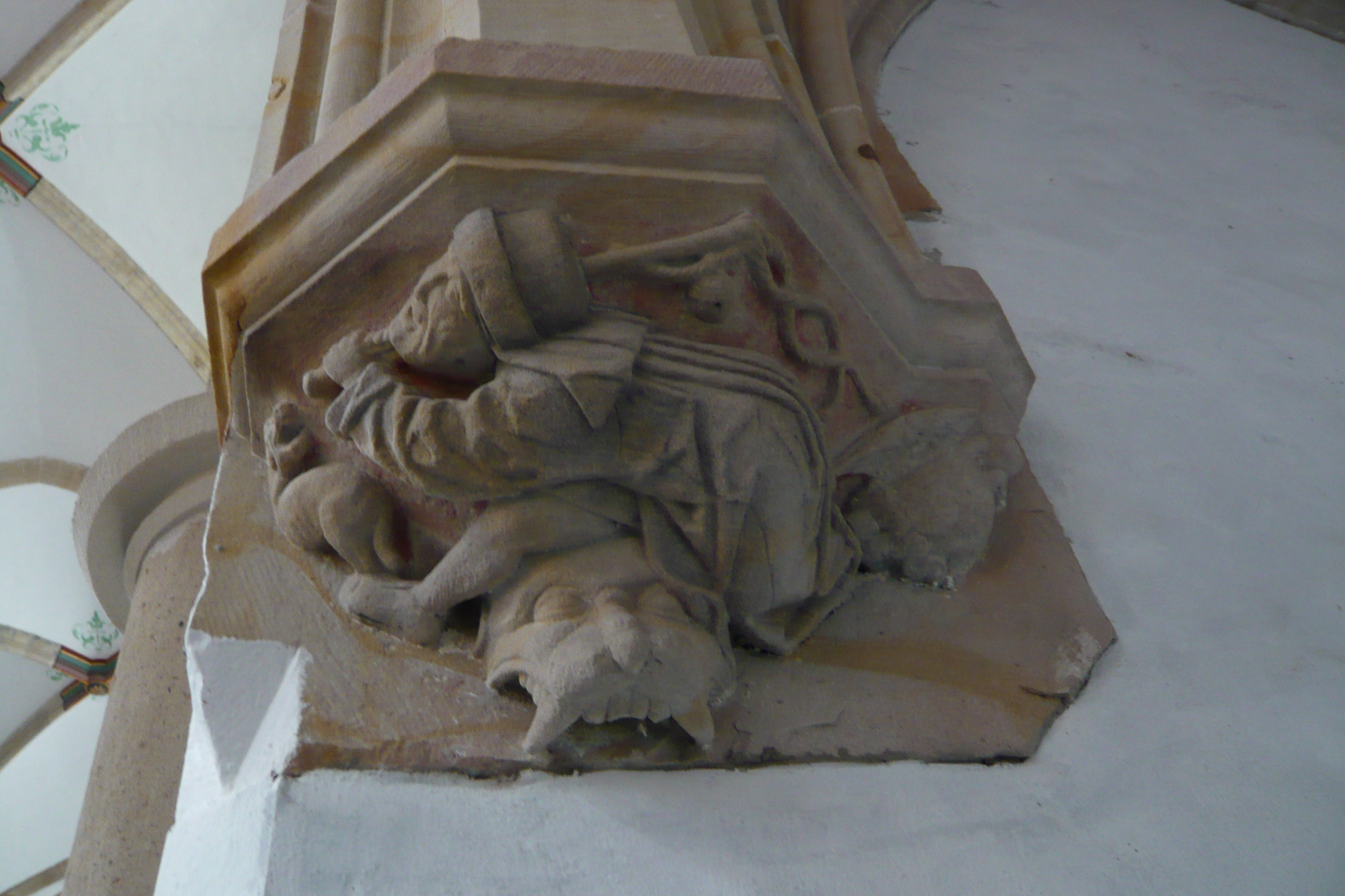 Sculpture of hondenslager, or dog-beater, in Grote Kerk, Haarlem.